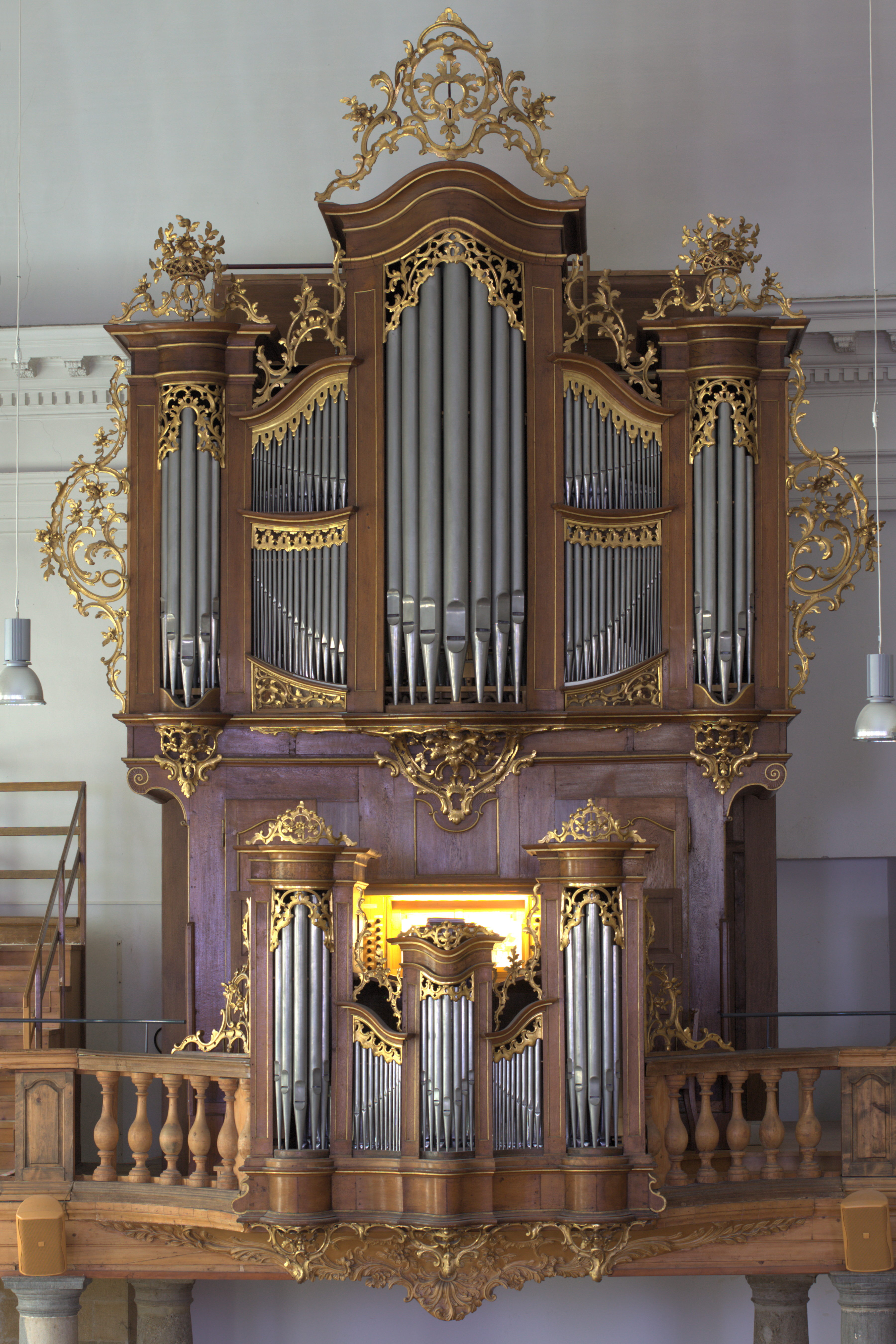 Temple d'Yverdon